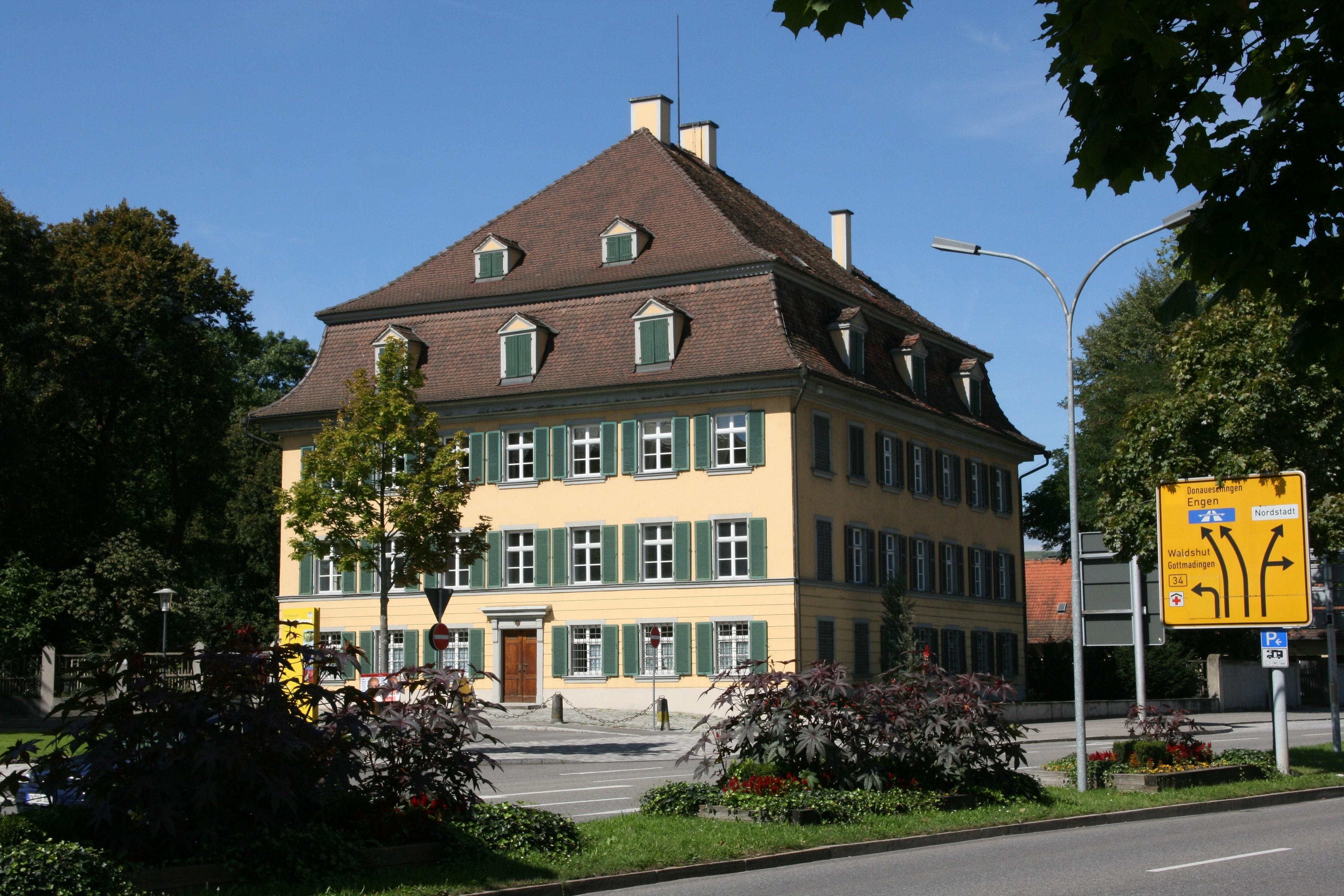 Oberes Schloss an der Hauptstraße in Singen (Hohentwiel)